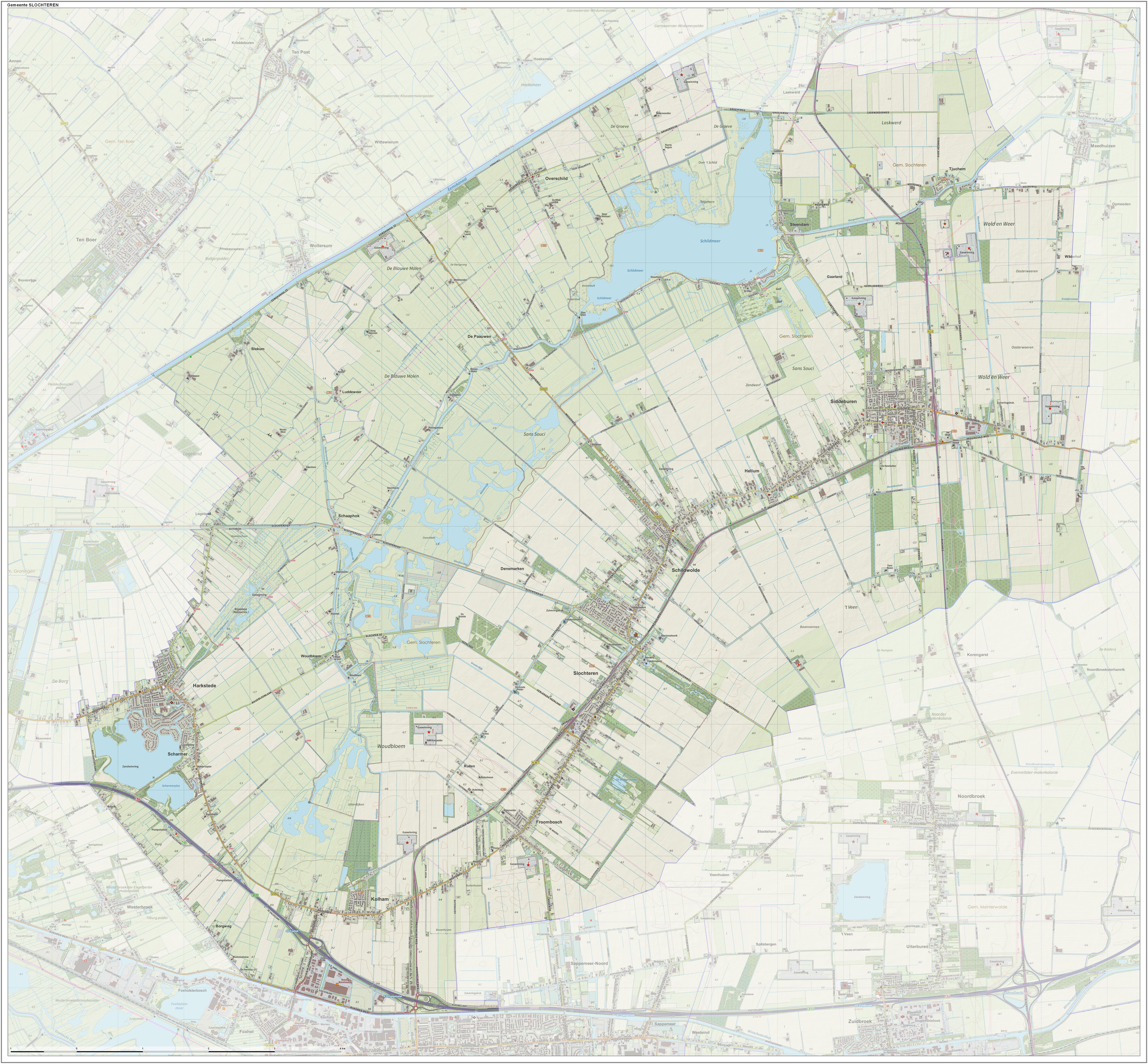 Topografische gemeentekaart. Resolutie: 400 pixels/km. Kaartbeeld samengesteld uit de open geodata van de Top10NL en Top25namen (Kadaster), Creative Commons-BY licentie. Gebouwvlakken uit open geodata BAG extract. Wegen uit de OpenStreetMap, OpenStreetMap community. Reliëfschaduw uit de Actuele Hoogtekaart AHN2. Samenstelling en kleurenschema: Jan-Willem van Aalst, met QGIS. Zie ook de Legenda.